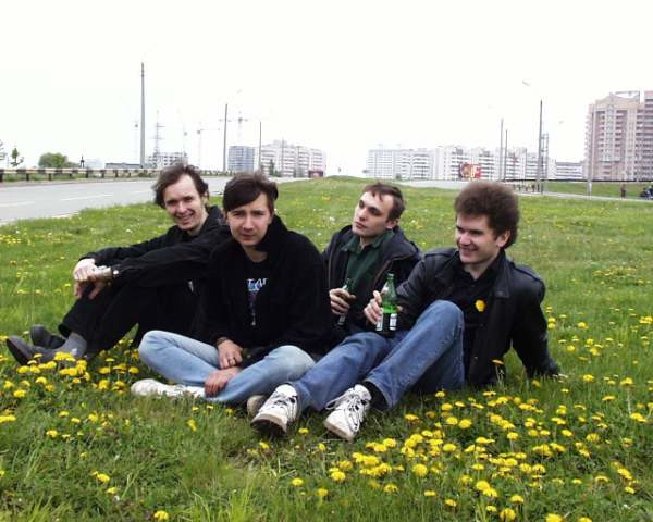 Склад 1997 року